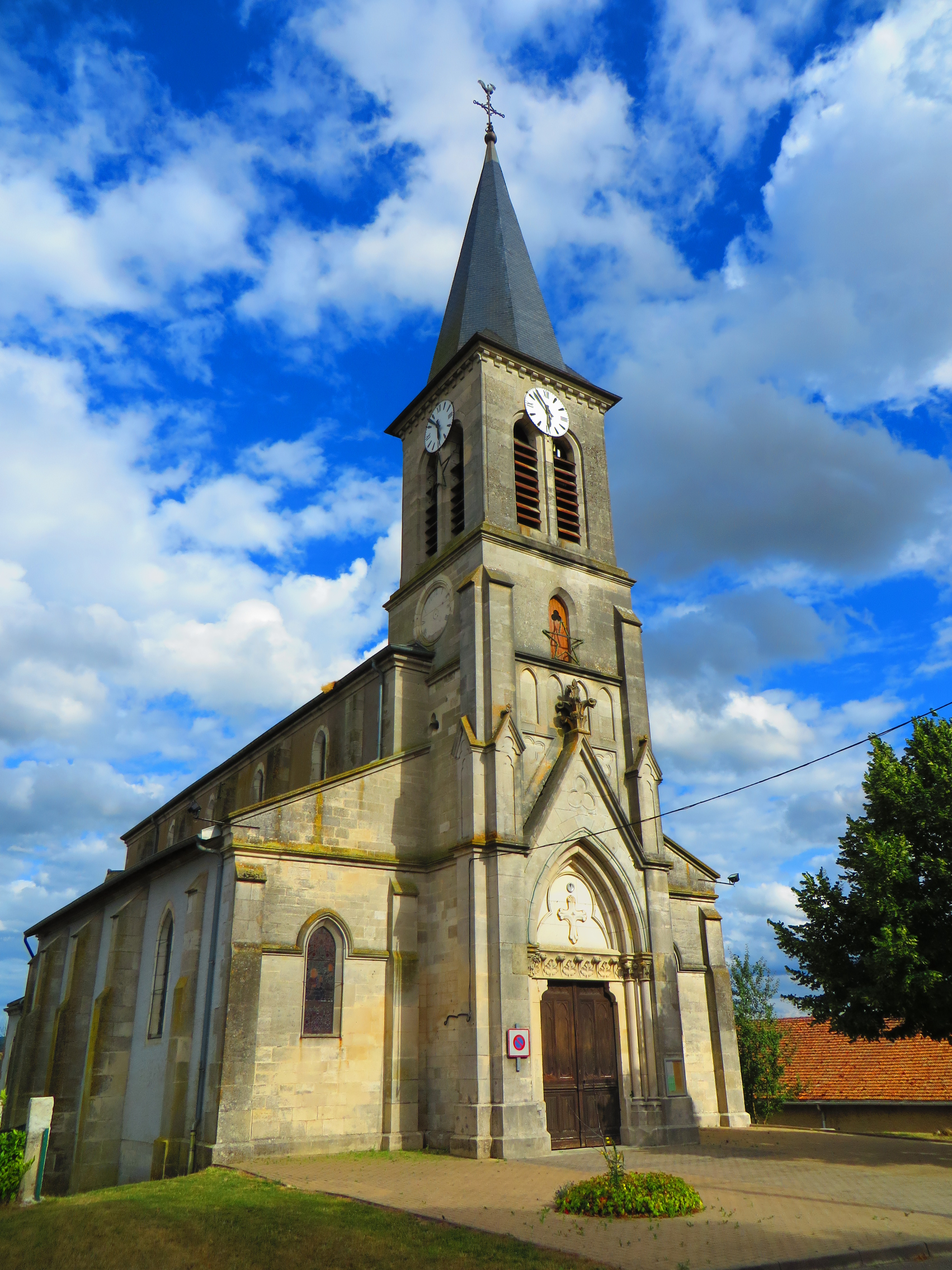 Dompcevrin L'église Saint-Symphorien